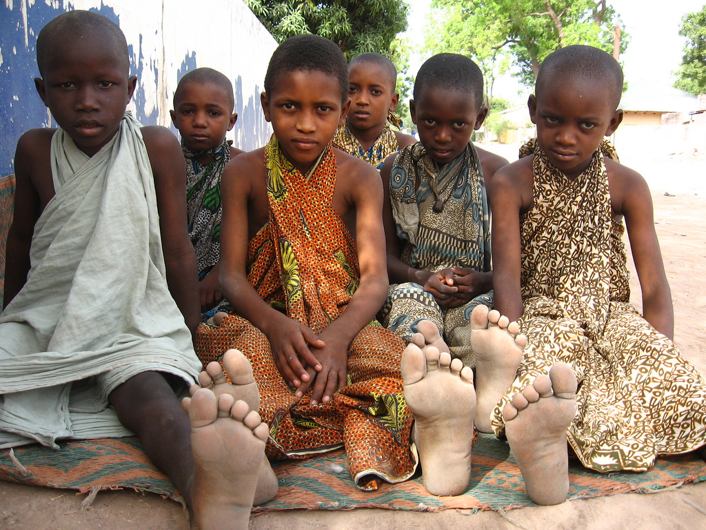 Velingara, Senegal